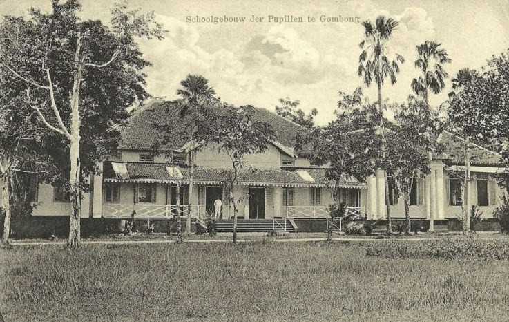 De pupillenschool te Gombong was een opleidingsschool voor inlandse militairen van het KNIL.